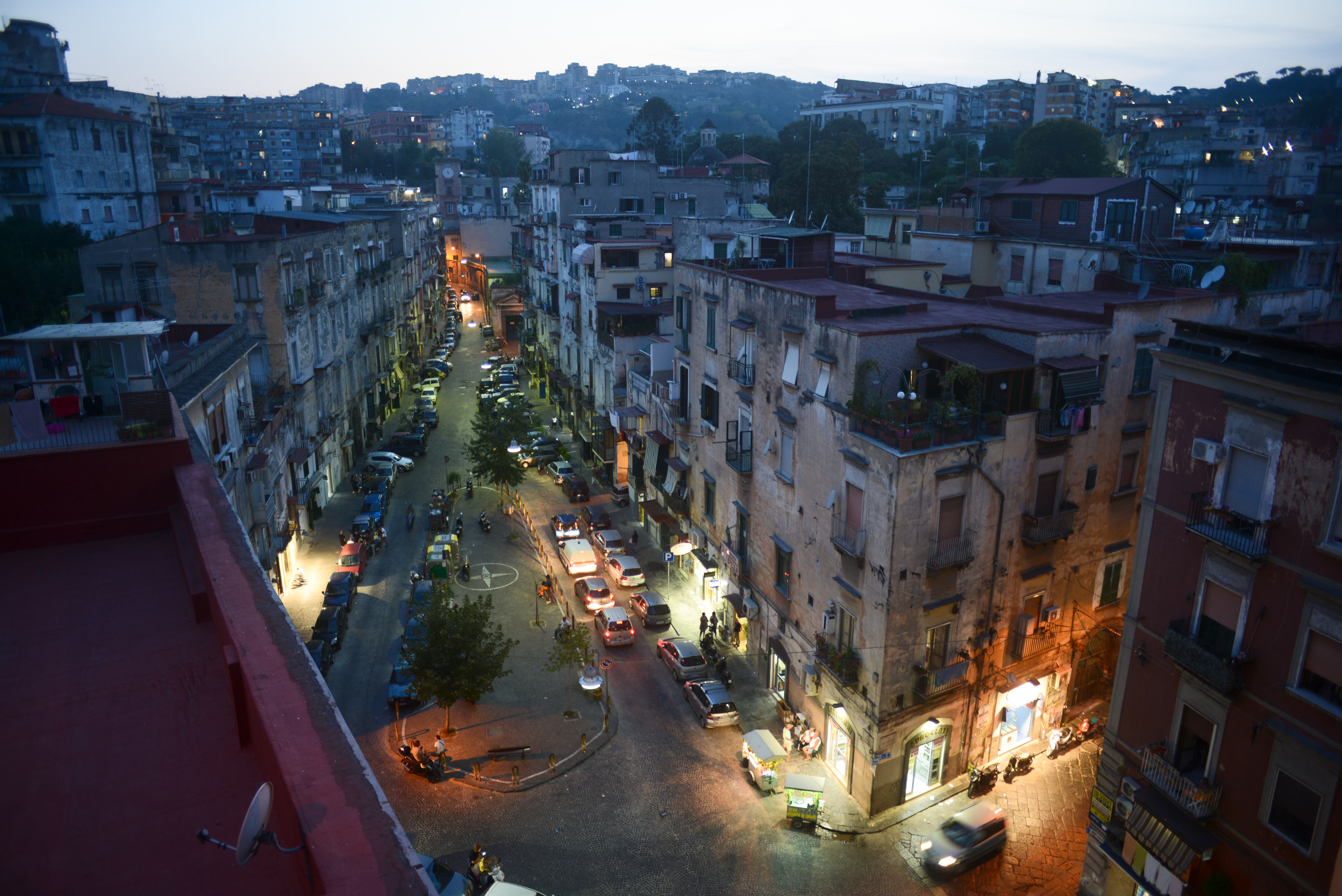 La Sanità, vista dal ponte omonimo su via Santa Teresa degli Scalzi